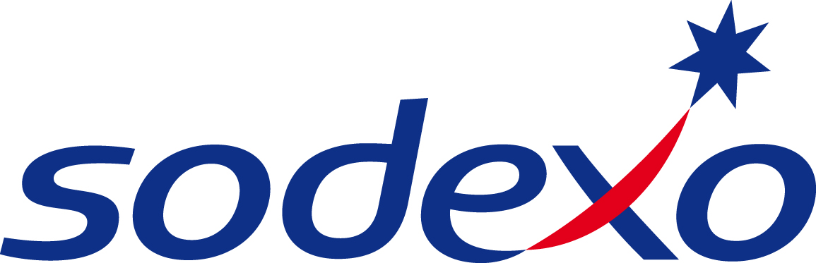 Logo společnosti